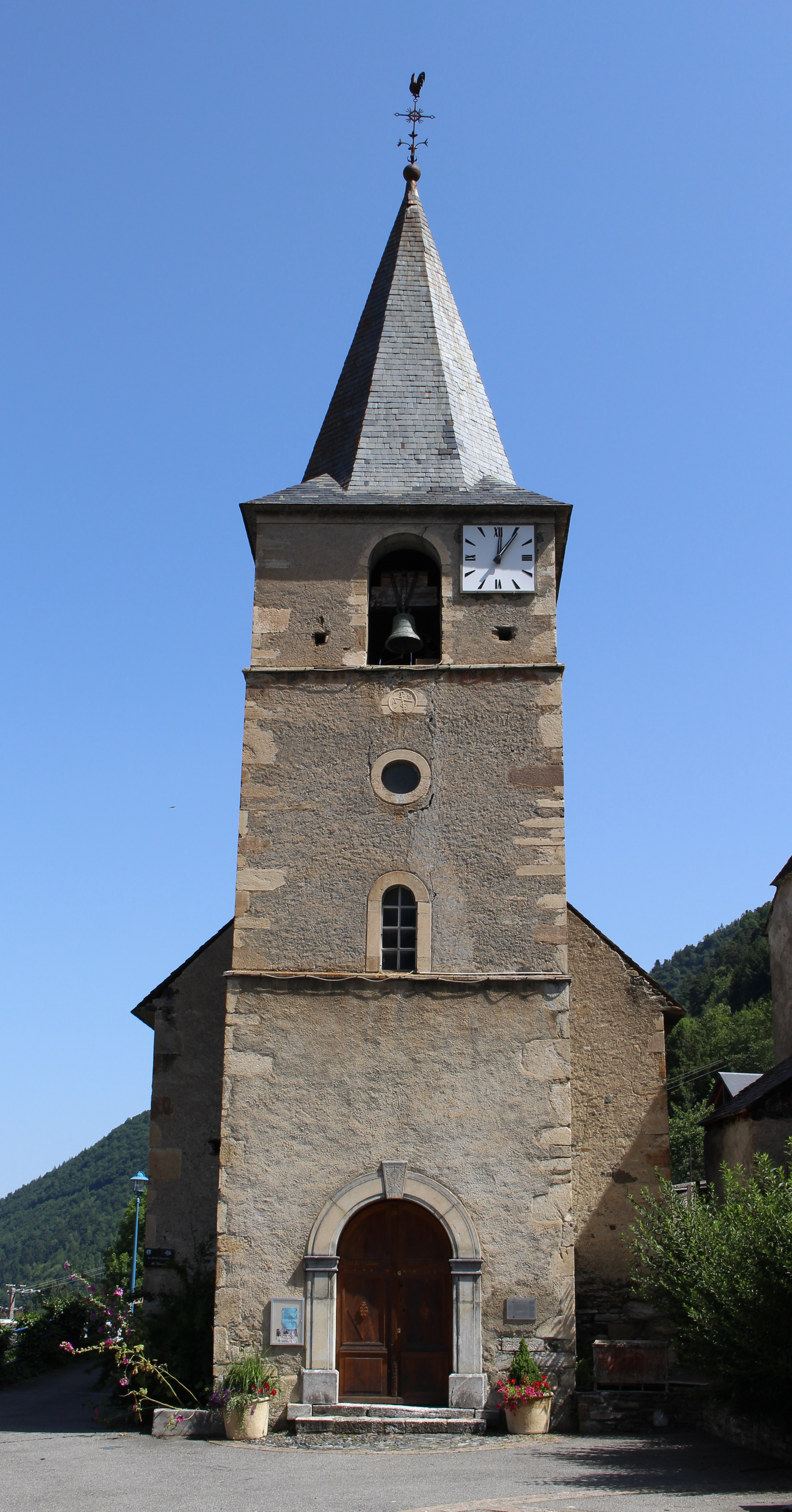 Église Sainte-Luce, Saint-Vincent de Camparan (Hautes-Pyrénées)